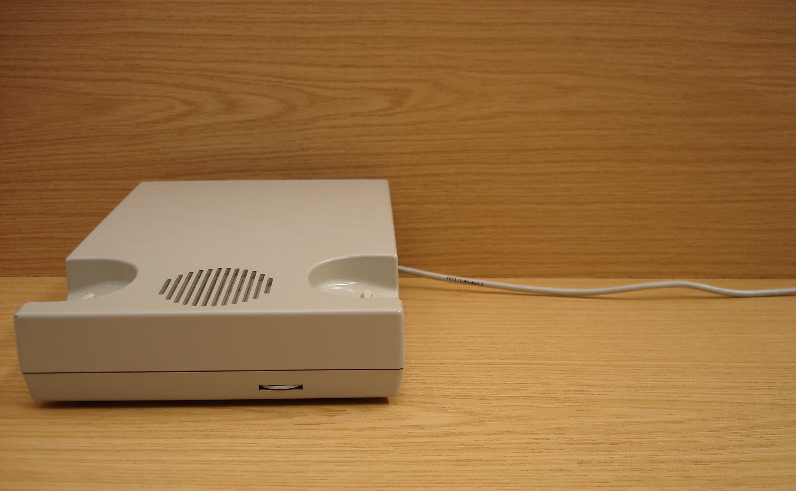 Ein Parallelmodem nach V.20 geschlossen Modemhersteller: Siemens Typ: D20P-A02 Baujahr: 01/78